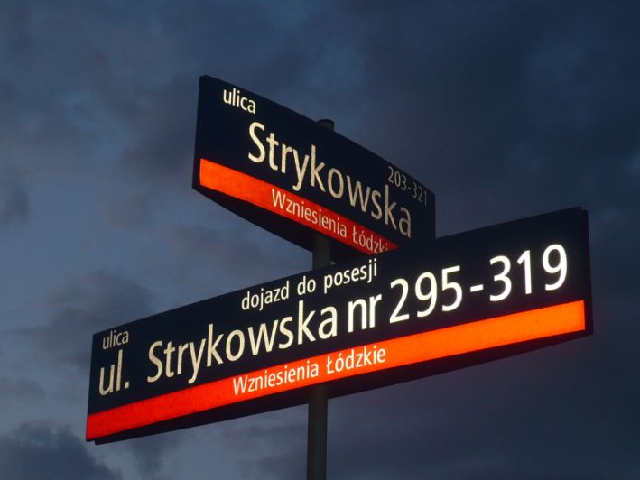 Oznakowanie szczególne Systemu Informacji Miejskiej w Łodzi - zaznaczony dojazd do posesji położonych w głąb ulicy Strykowskiej, które posiadają jej numerację porządkową.